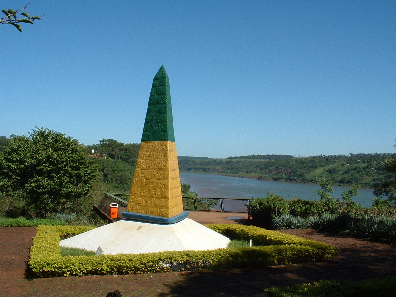 Vista do Marco das três Fronteiras, Foz do Iguaçu, Paraná, Brasil.